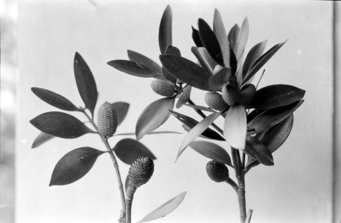 Negatief. De vrouwelijke bloeiwijze van de Agathis borniensis